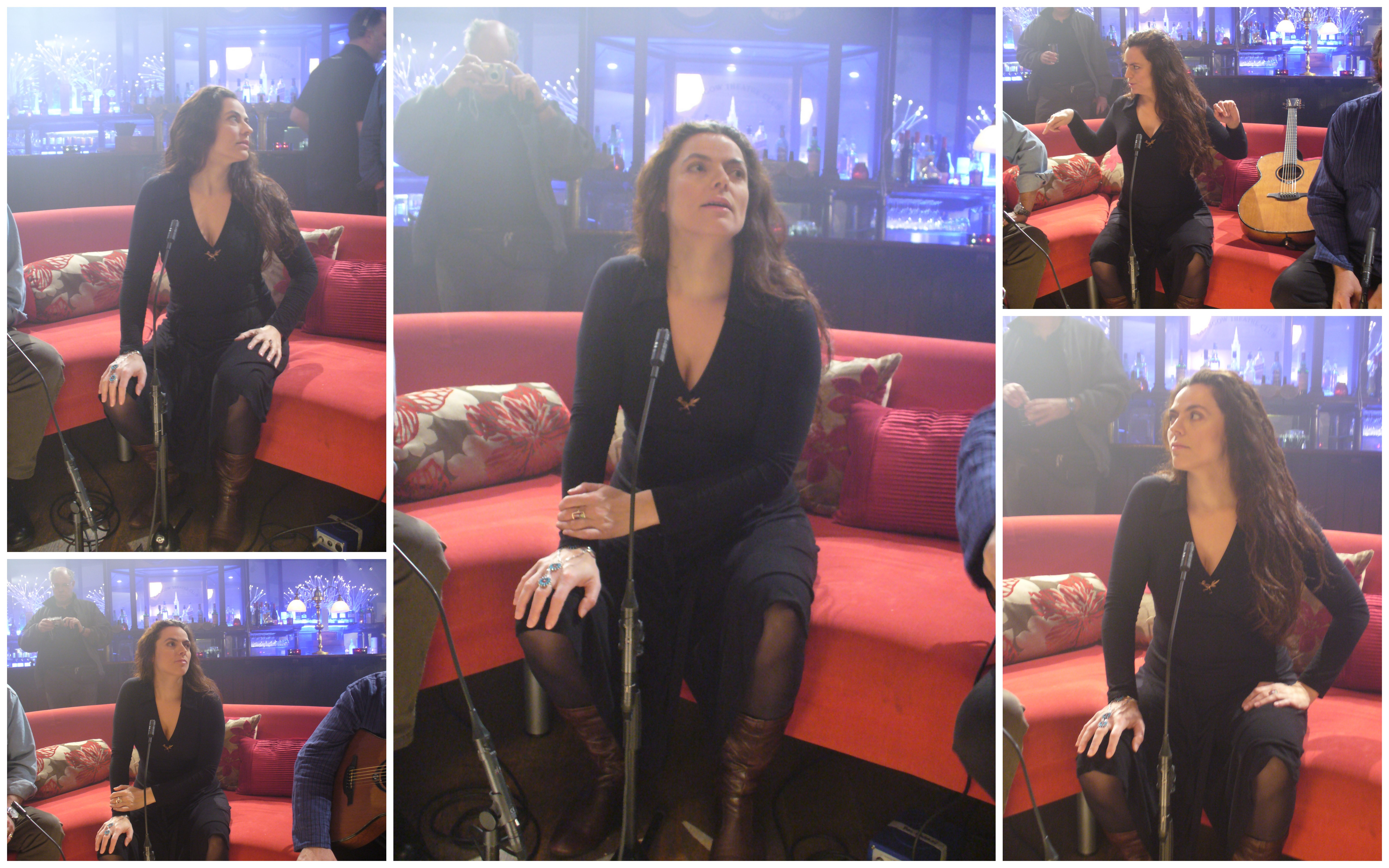 Marthe Vassallo lors de l'enregistrement d'une émission sur la chaine de télévision écossaise BBC Alba en 2012